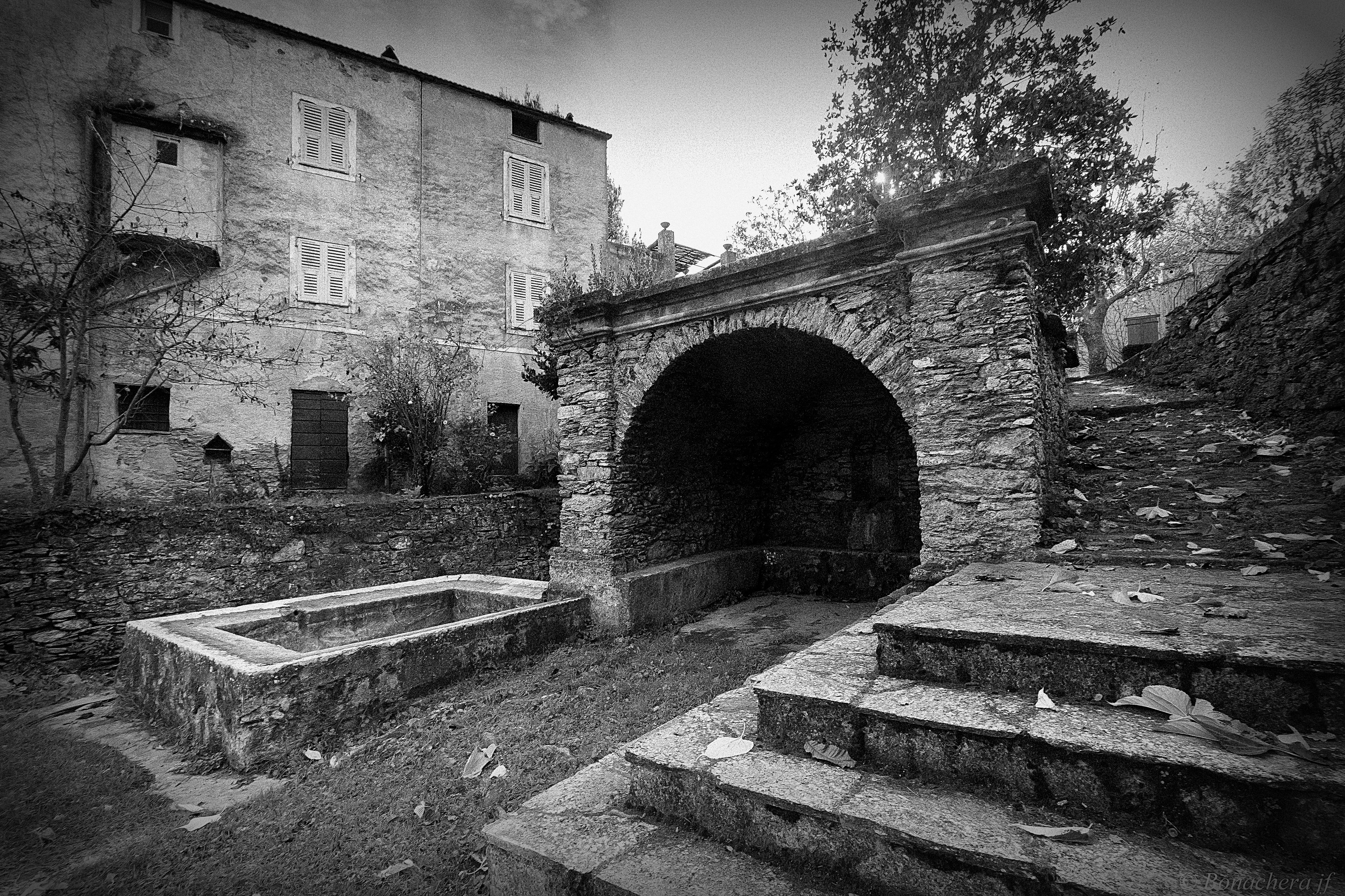 Corsu: Rapale (Corsica) - Funtana lavatoghju di a Rapalinca